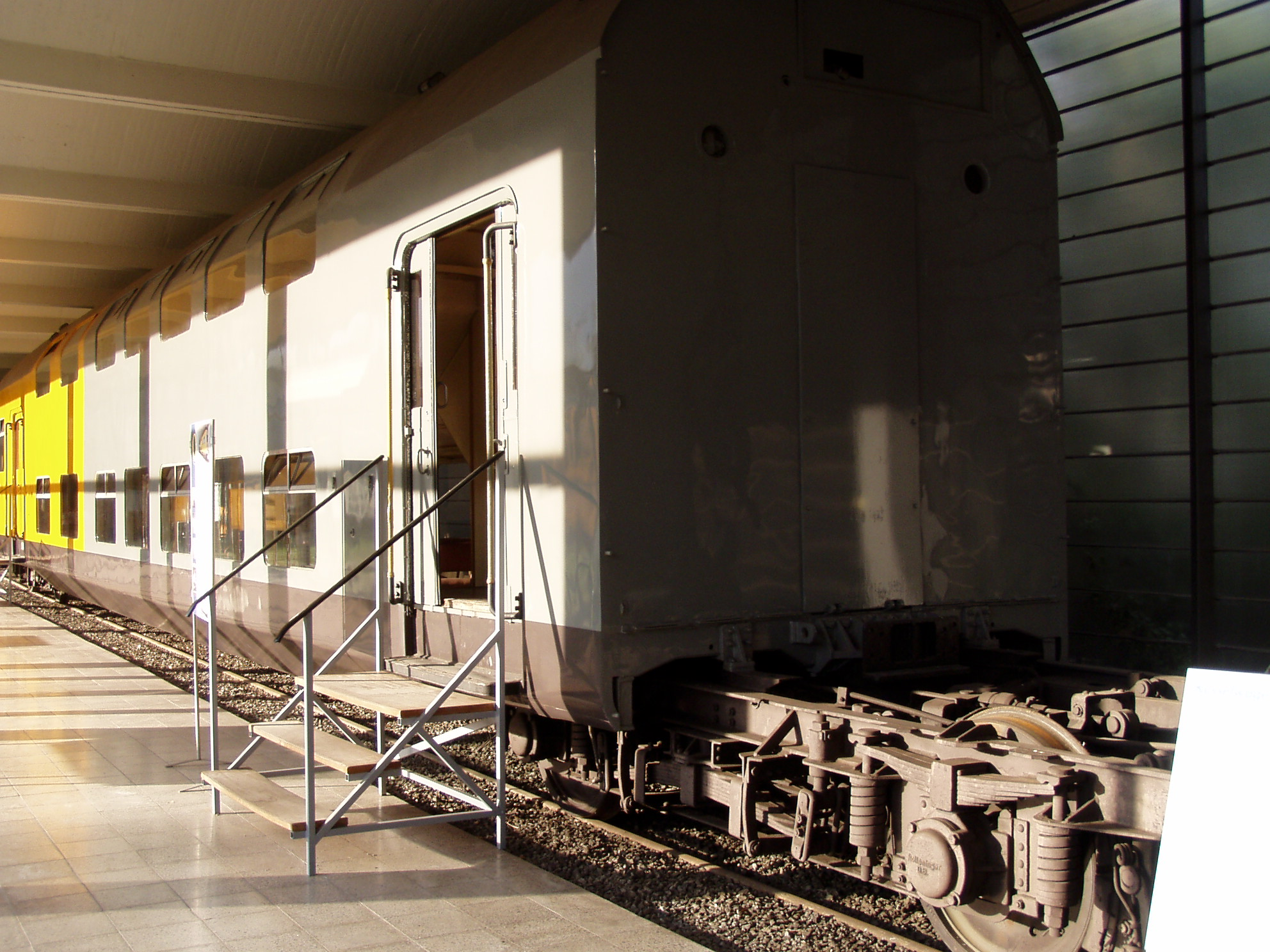 Ansicht des Jacobs-Drehgestelles des 6-achs. Doppelstocksteuerwagens "Lübeck" der Linke-Hoffman-Werke Breslau